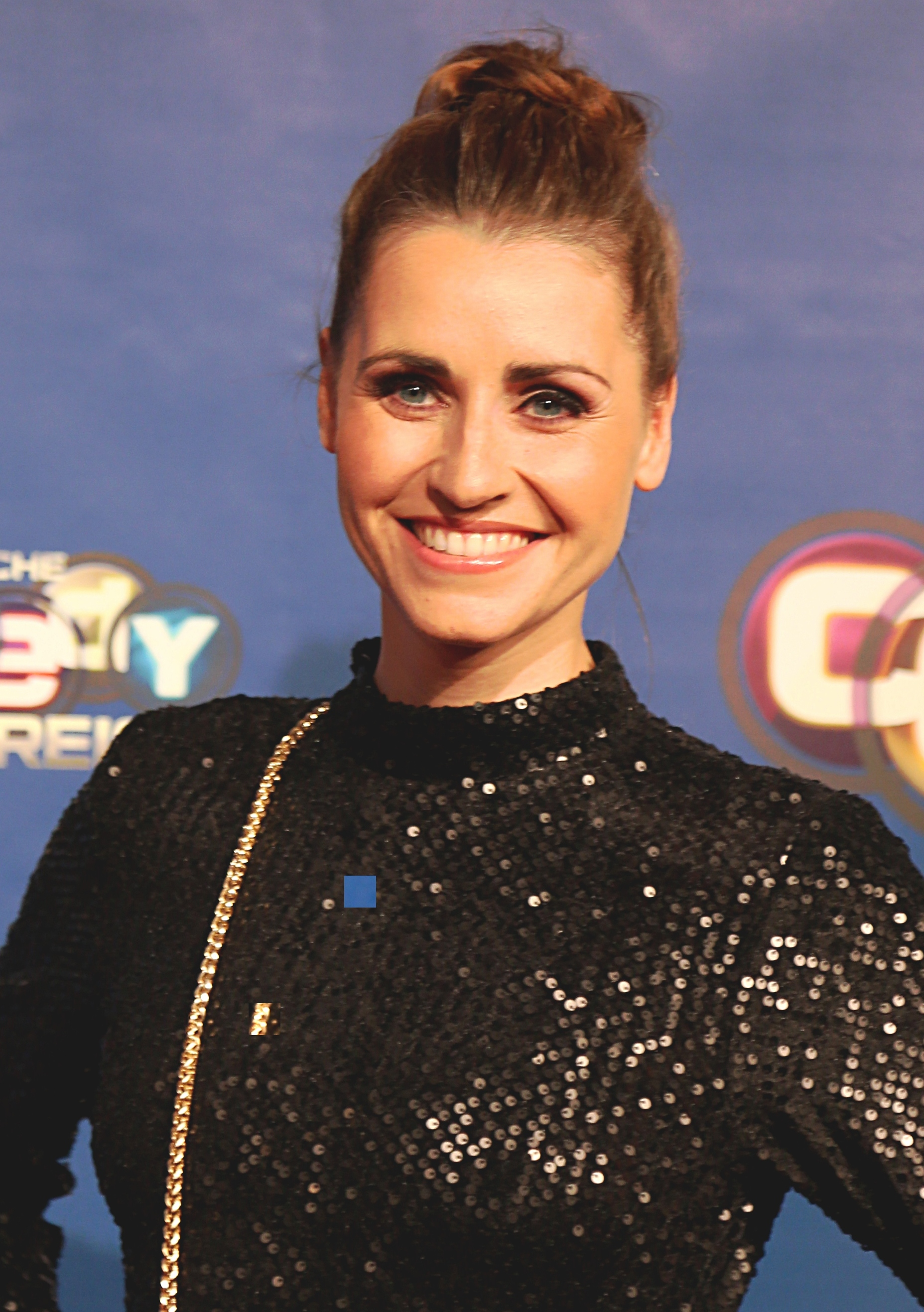 Bella Lesnik beim Deutschen Comedypreis 2017.